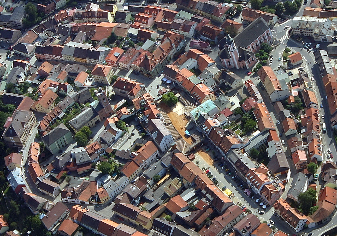 Luftaufnahme